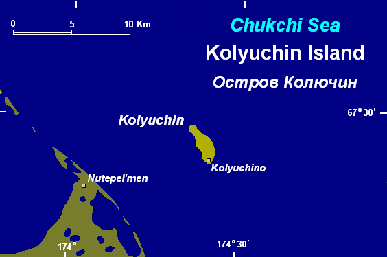 Востраў Калючын.